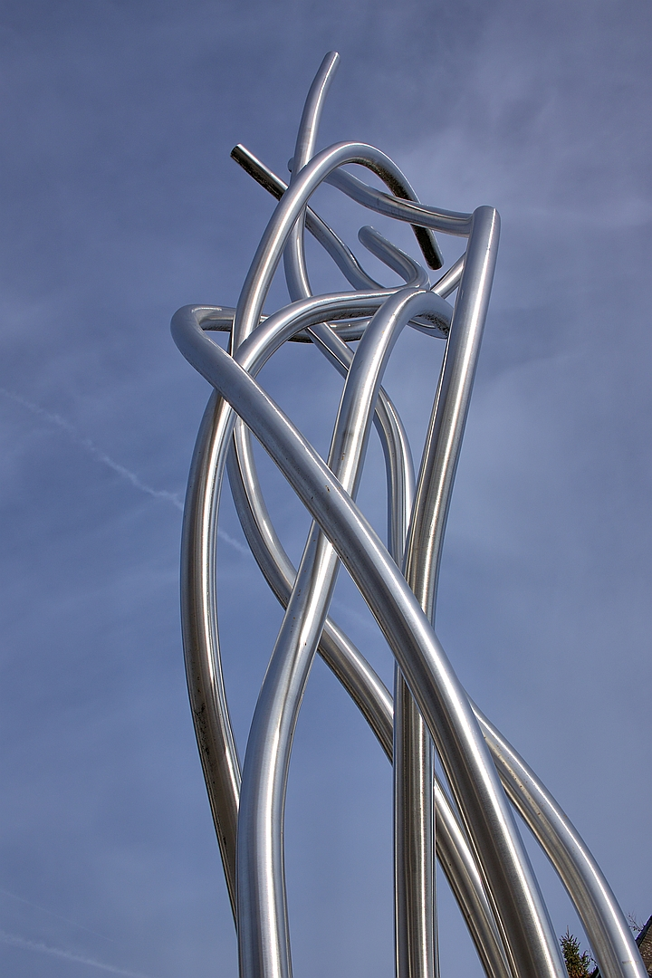 Skulptur "Aufstrebende Kräfte" (2008) von Gertrude Reum (*1926 Saarbrücken †2015 Buchen / Odenwald). Chromnickelstahl, 6 m hoch. Standort: Kreisverkehr Hettinger Str. / Am Haag / Schüttstr., Buchen (Odenwald). Single photo enhanced with easyHDR 3.12.0